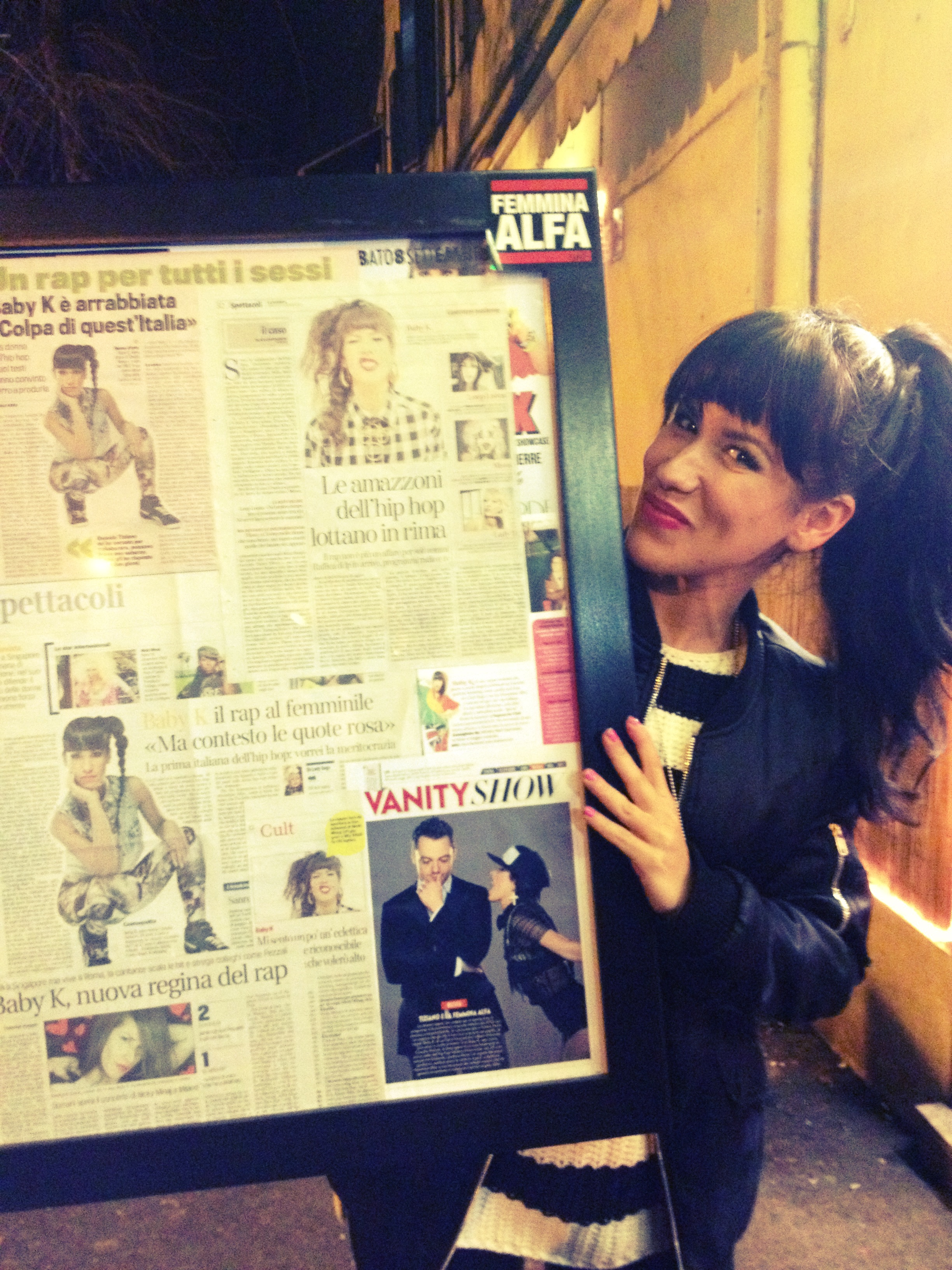 Baby K (pseudonimo di Claudia Nahum), rapper e cantante italiana.